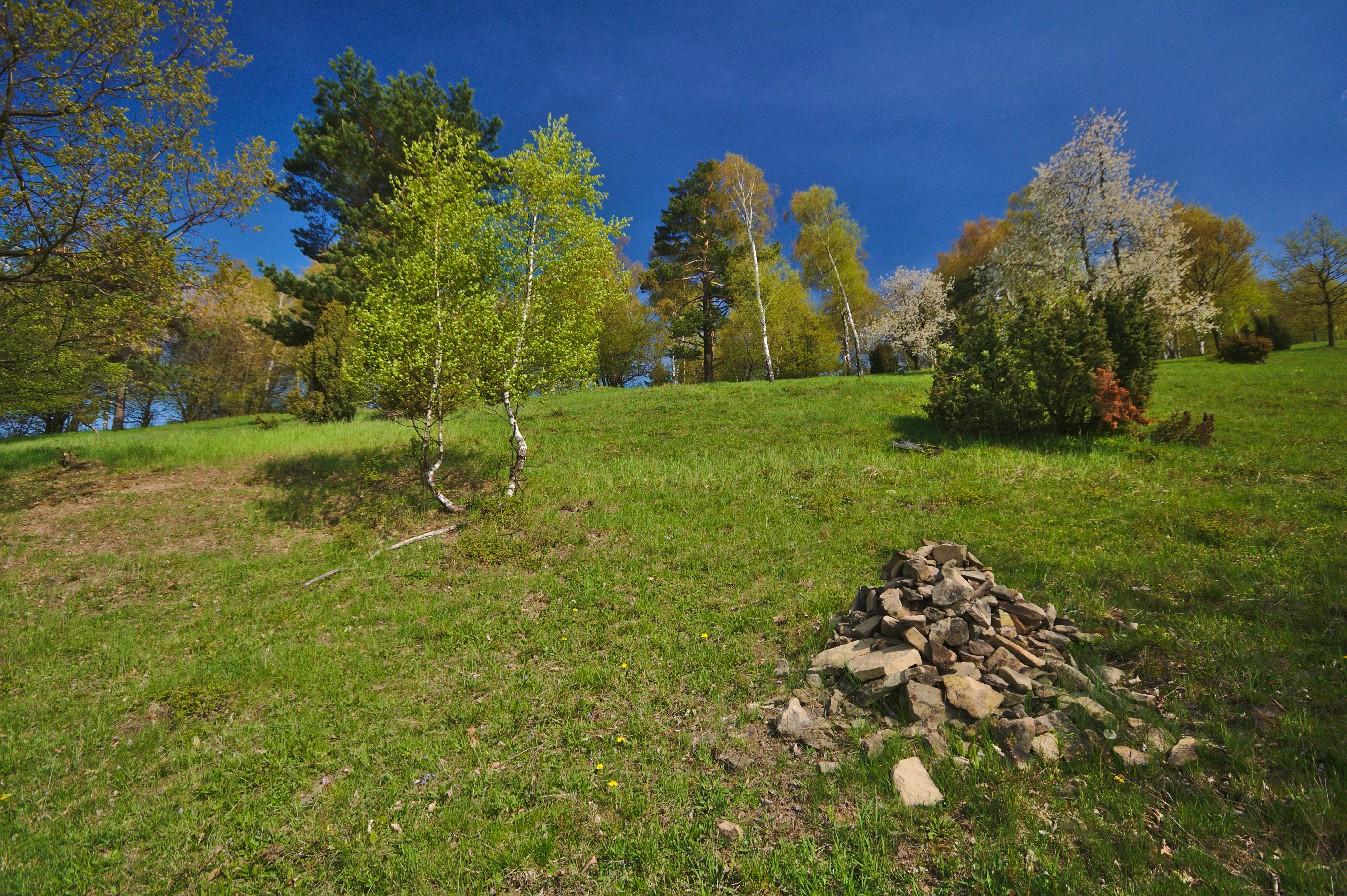 Přírodní rezervace Ploščiny, okres Zlín